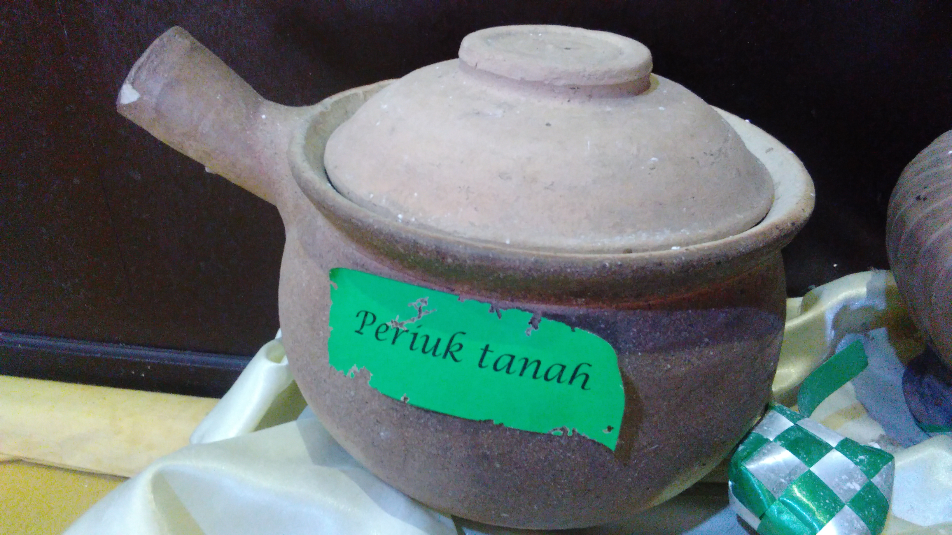 Periuk Tanah